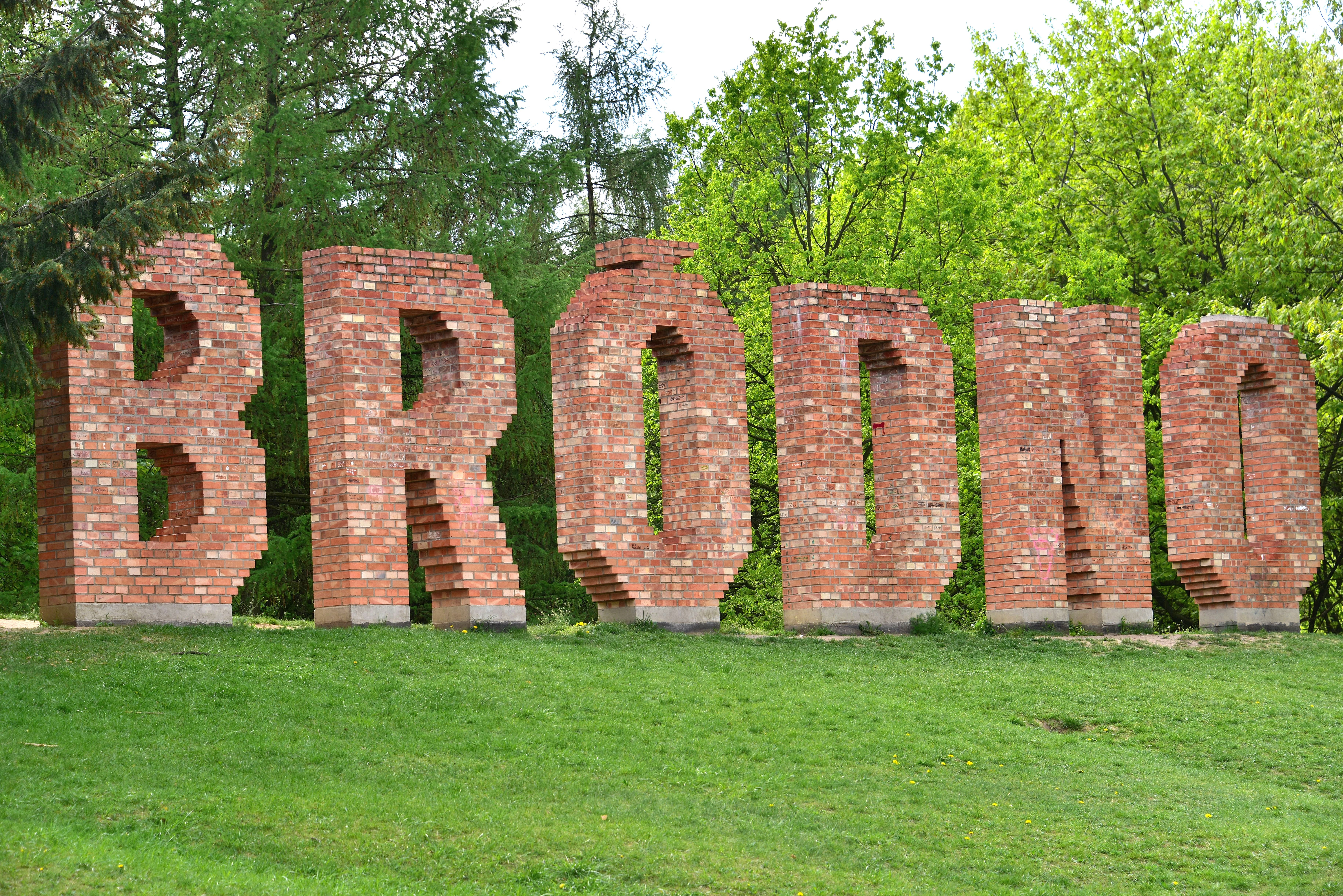 Jens Haaning, Bródno, 2011. Park Bródnowski w Warszawie